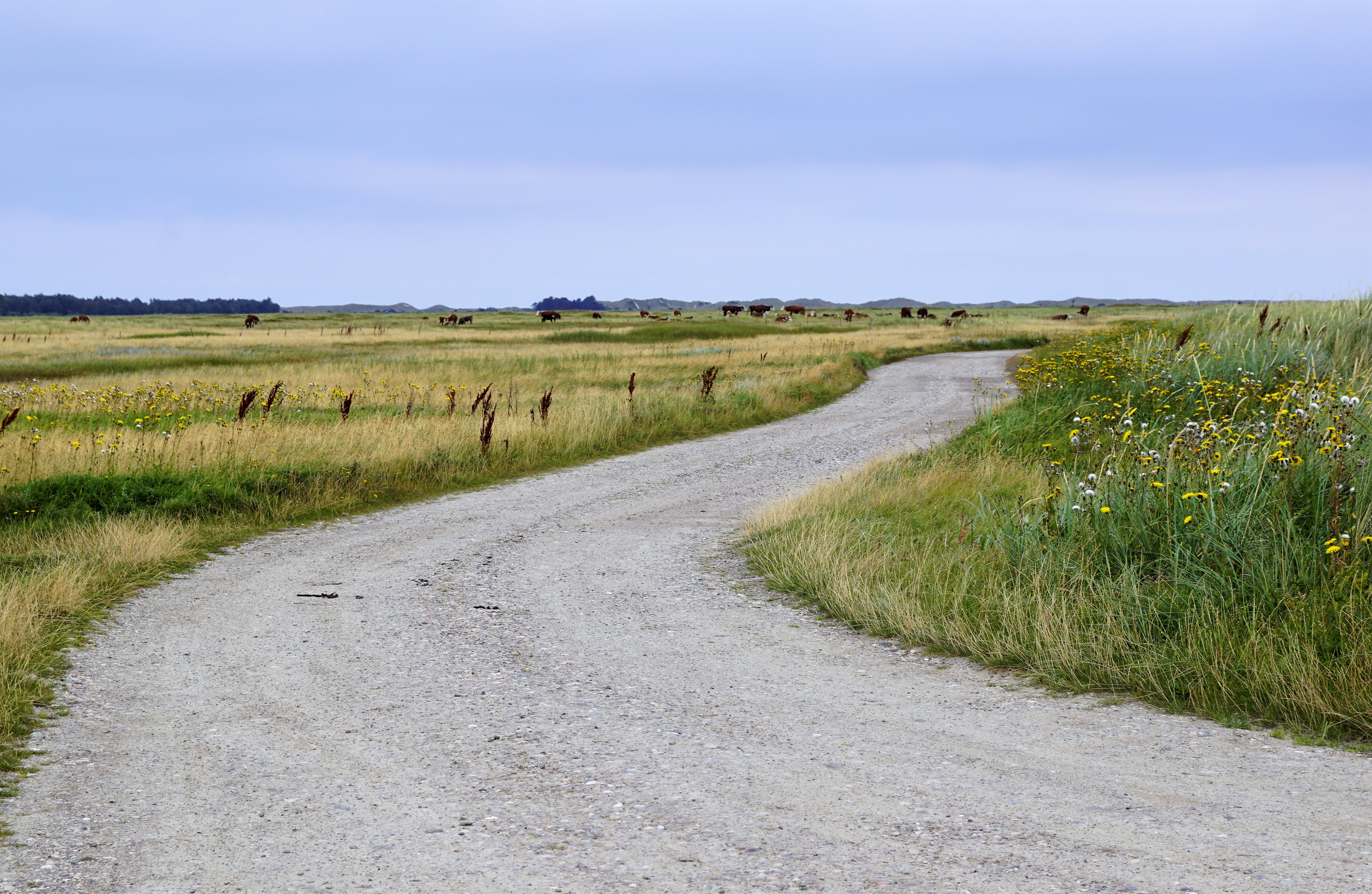 Syrsig set mod nord med Danzigmand Klit i baggrunden